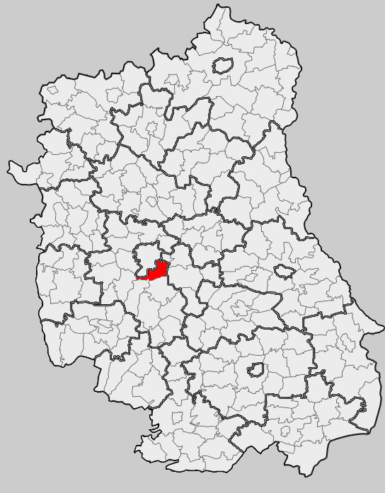 Map of gmina Głusk, Lublin county, Lublin voivodship Mapa gminy Głusk, powiat lubelski, województwo lubelskie